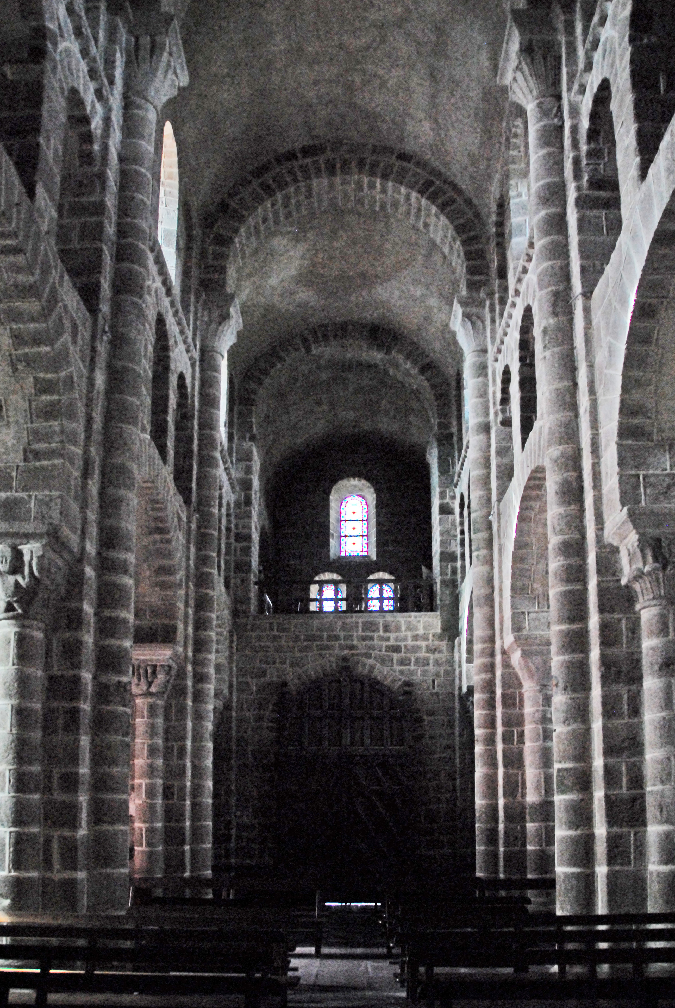 N.-D. de Châtel-Montagne, Mittelschiff nach W